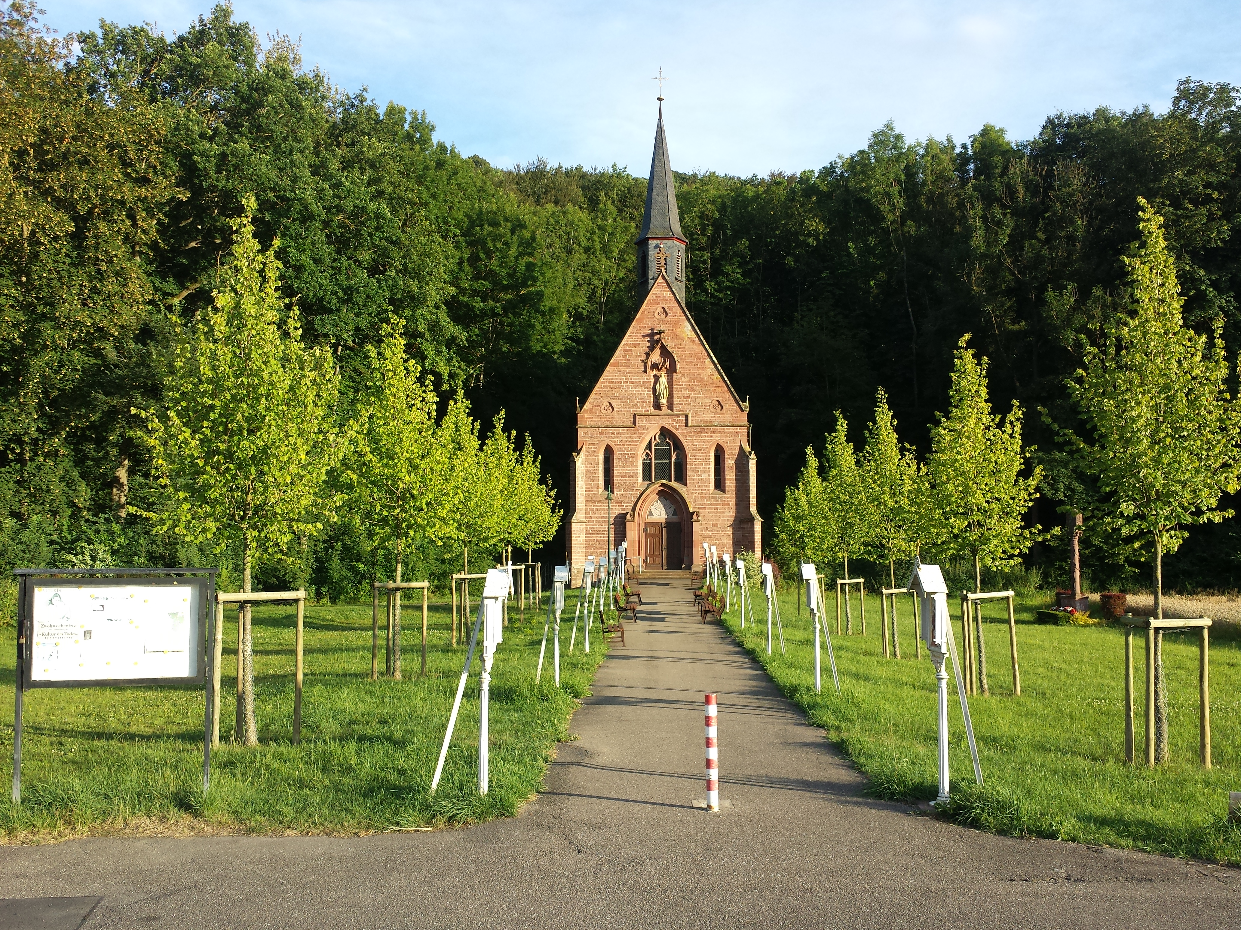 Die Wallfahrtskapelle Liebfrauenbrunn liegt etwa 2 km außerhalb Werbachs im Welzbachtal in Richtung Werbachhausen. Im 15. Jahrhundert wurde die Kapelle der Muttergottes geweiht. Das Wasser der Quelle, die sich unter der Kapelle befindet, wird von Gläubigen mit Vertrauen auf die Fürsprache der Muttergottes in Krankheiten, besonders bei Augenleiden gebraucht.